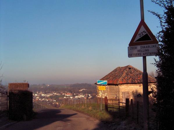 Limburgs: Keuteberg